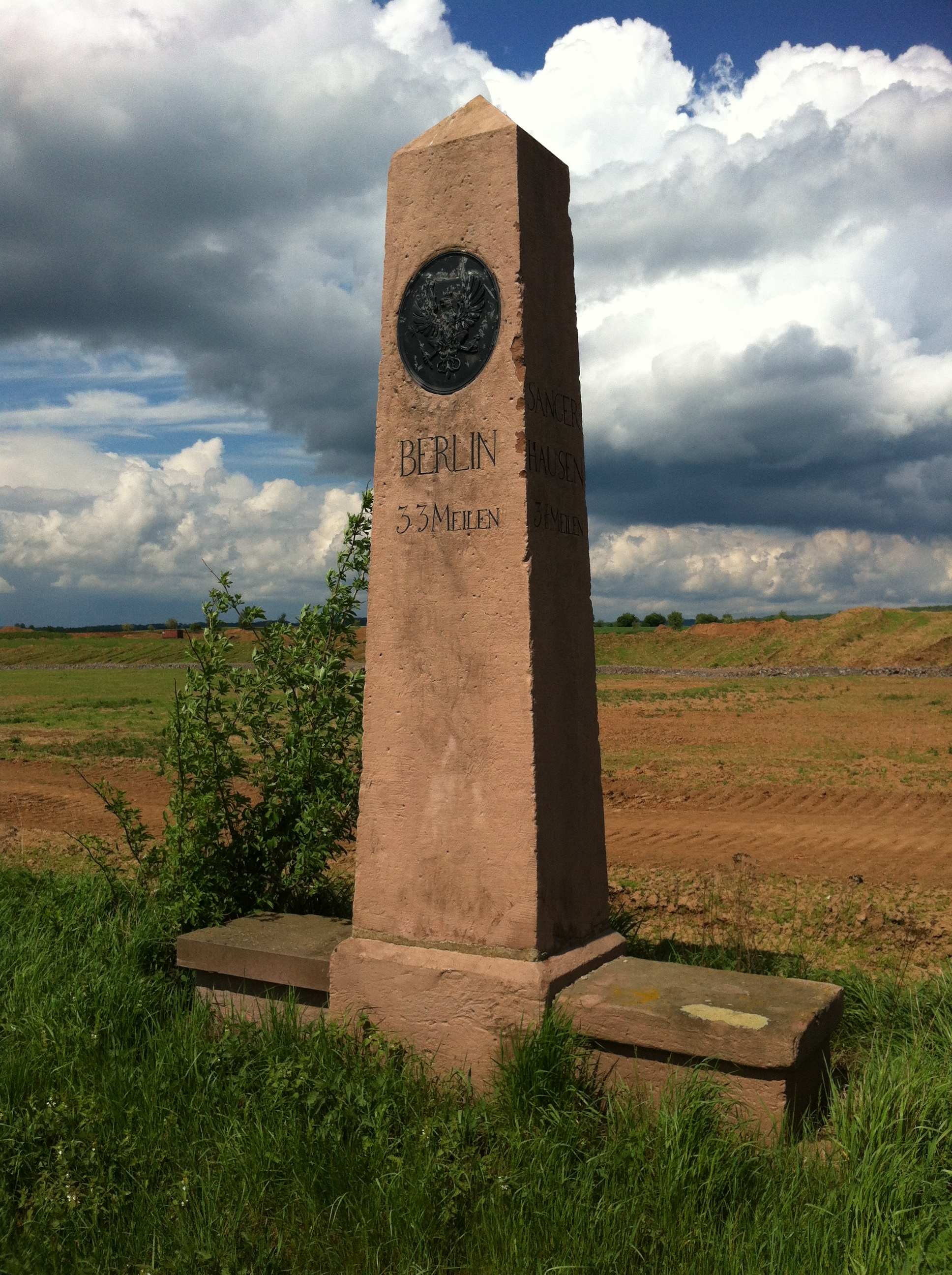 Preußischer Ganzmeilenobelisk an der L3080 bei Urbach.